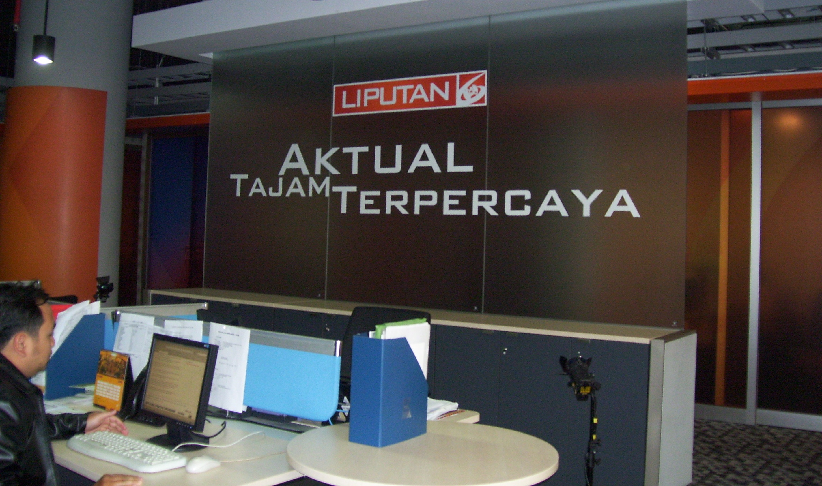 Liputan 6 SCTV